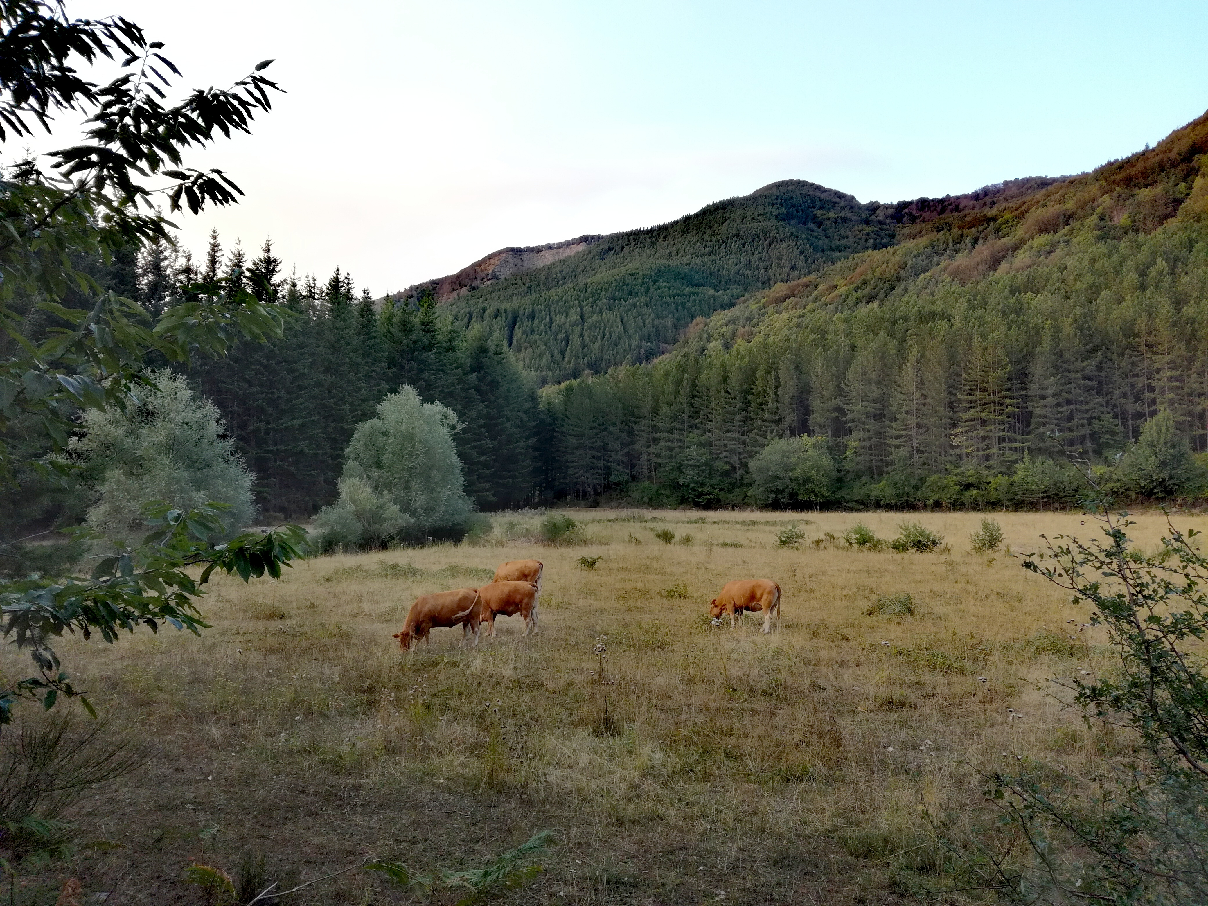 Pascoli nei pressi di Rincine